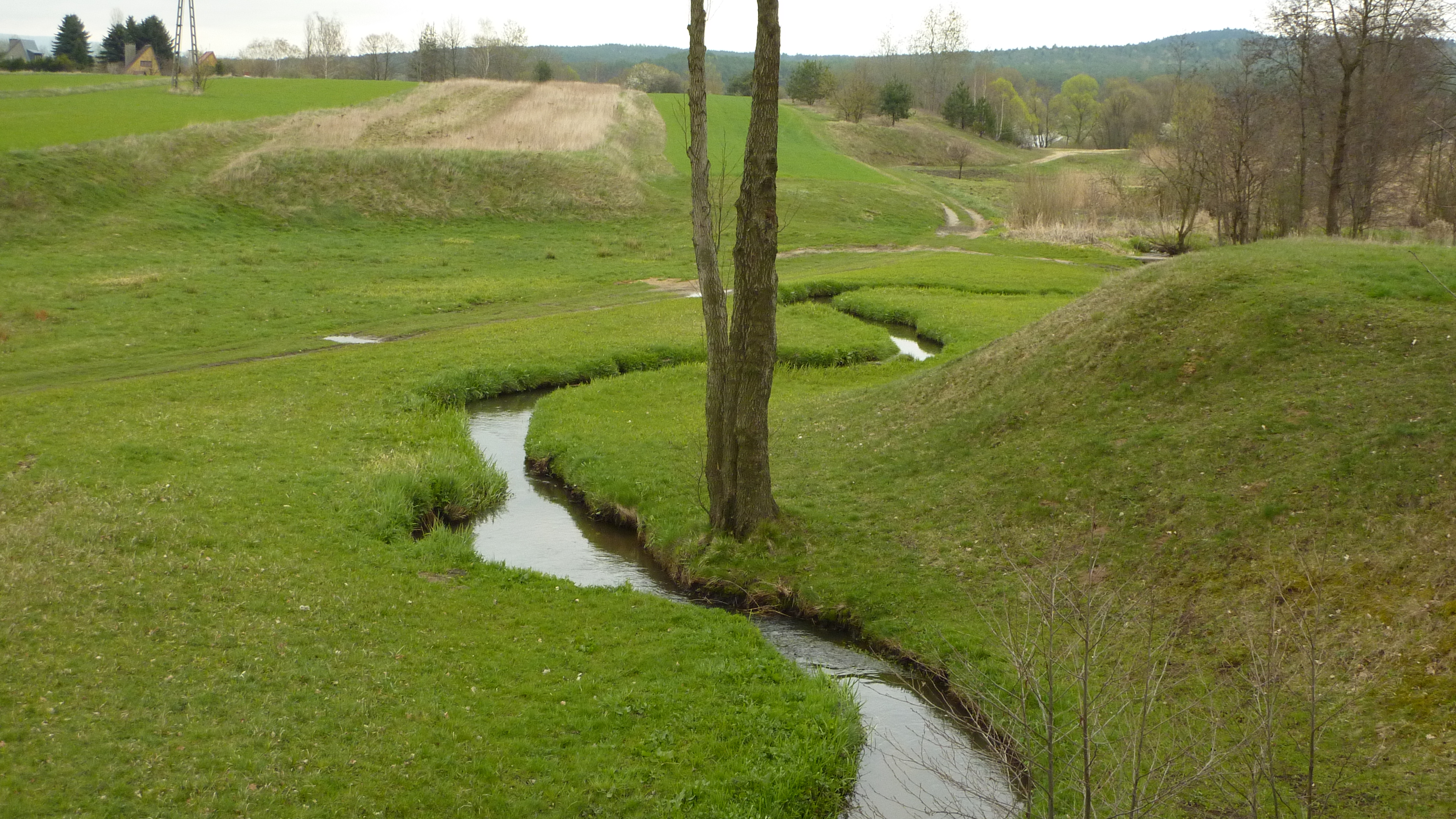 Rzeczka Zagórka na granicy administracyjnej Kielc i gminy Daleszyce